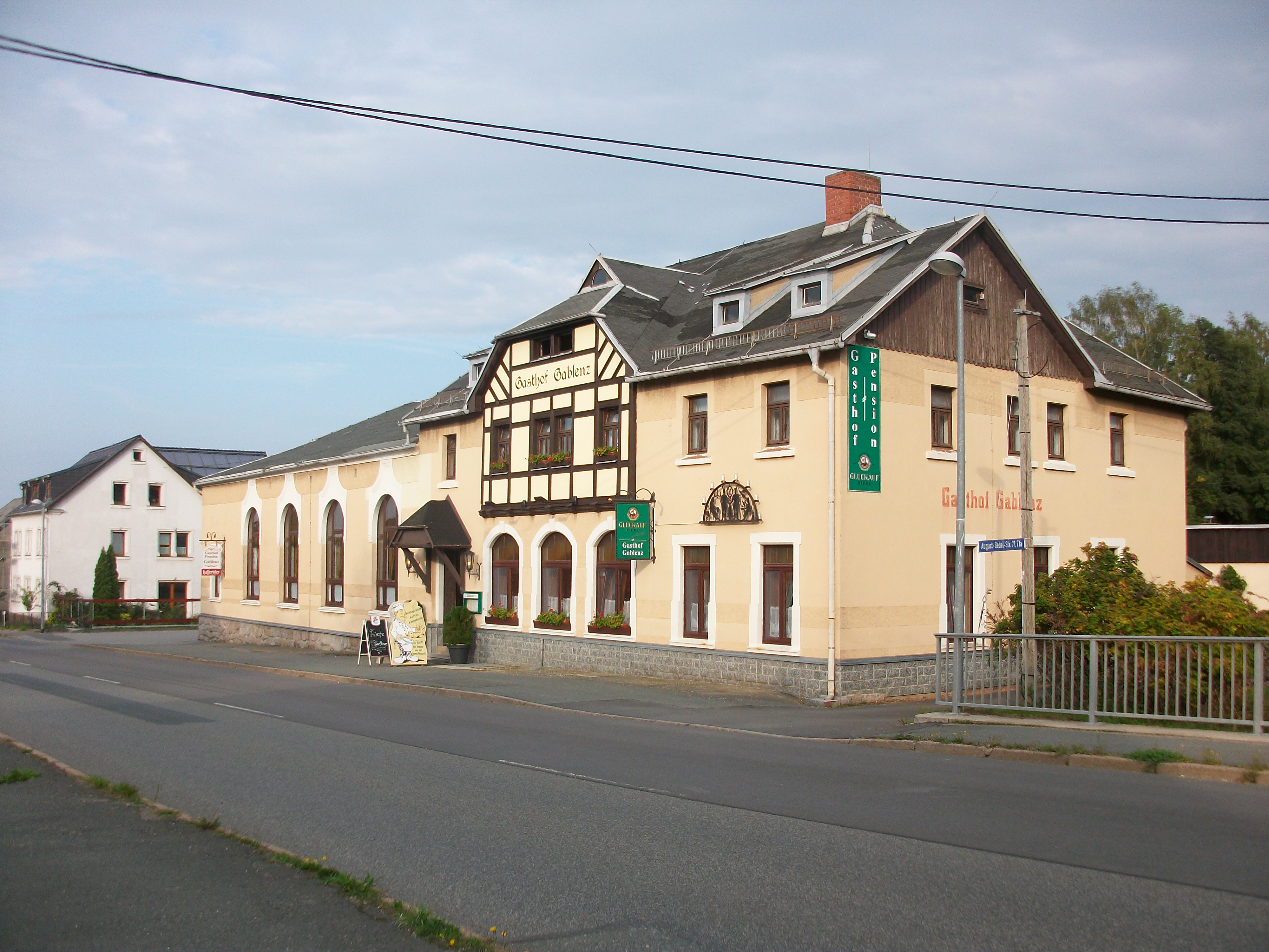 Gablenz (Stollberg), August-Bebel-Straße 69 (Gasthof Gablenz)